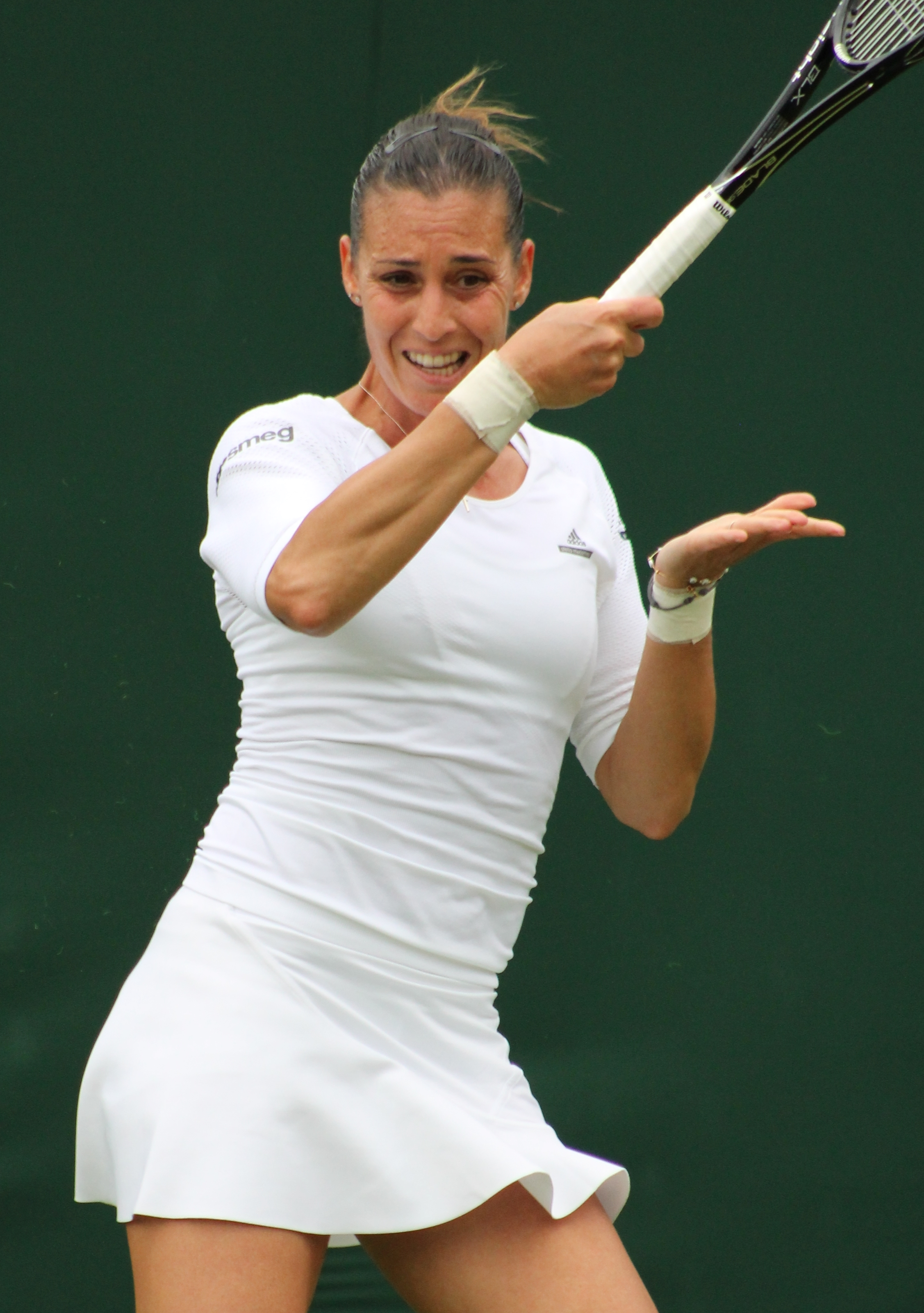 Pennetta WM14 (21)